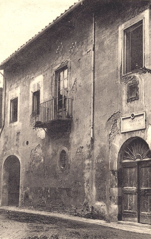 Casa natale di Galileo Galilei alla fine dell'Ottocento - Autore sconosciuto Fonte